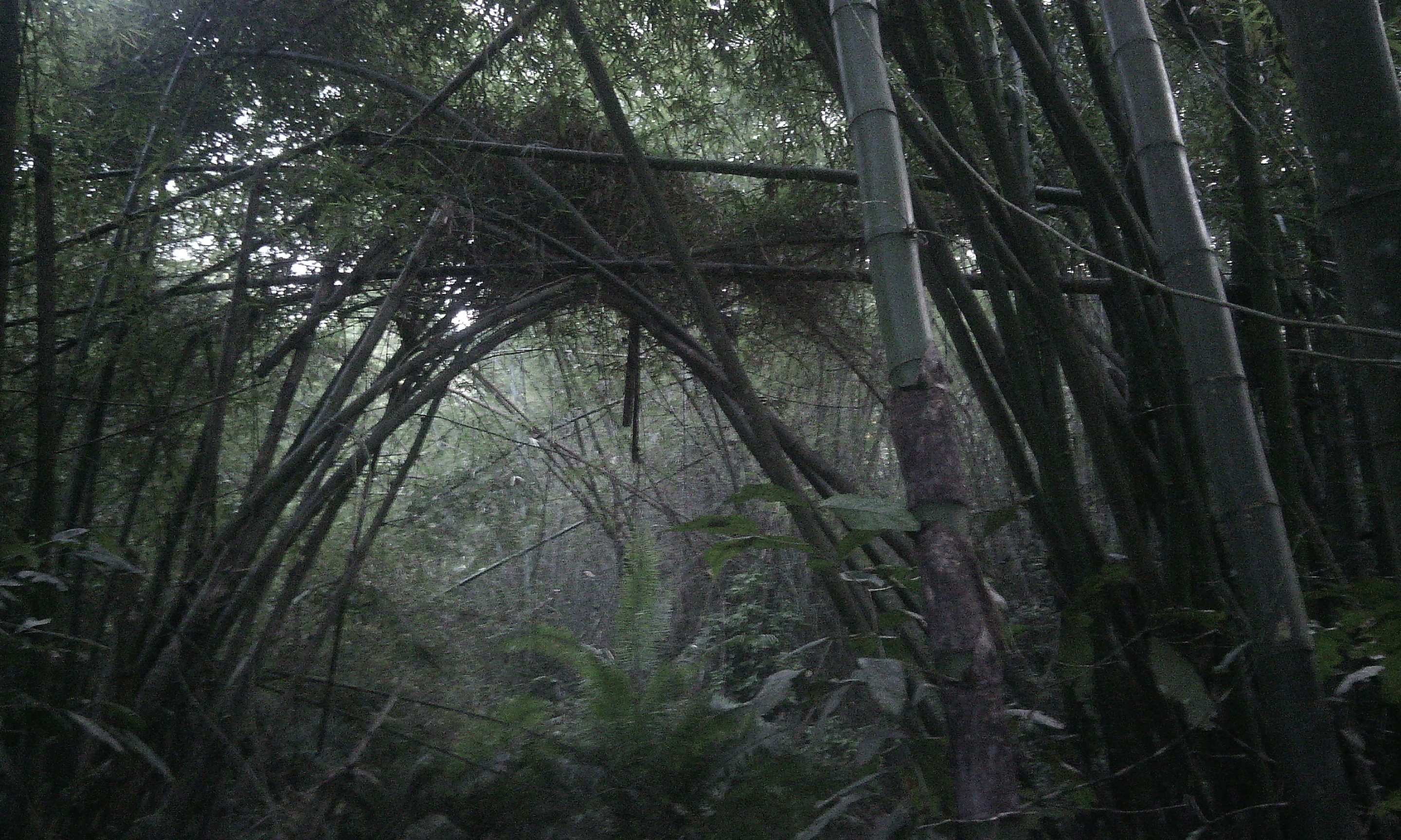 লাউয়াছড়া জাতীয় উদ্যান